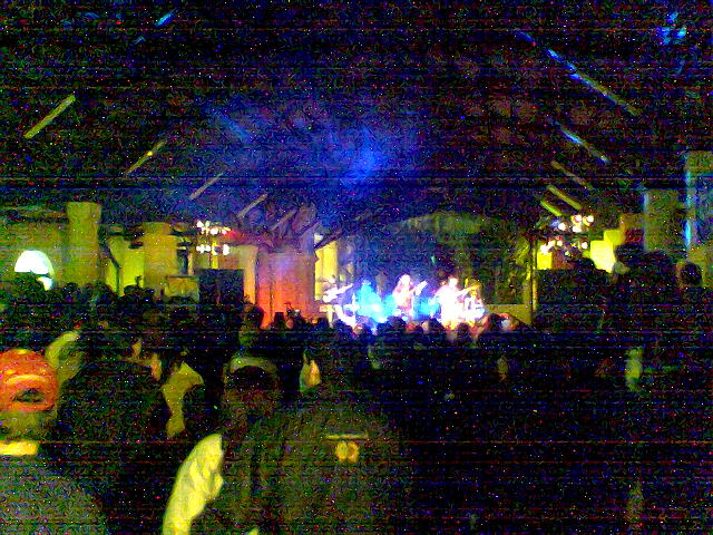 La Secreta. Rock Paraguayo. Estación de Ferrocarril. Asunción. 2007